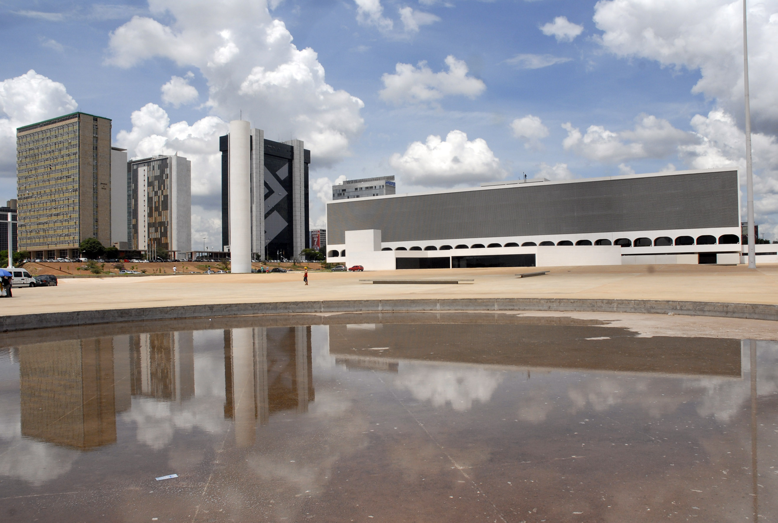 Biblioteca Nacional Brasília - Vista da Biblioteca Nacional, do Conjunto Cultural da República, na Esplanada dos Ministérios